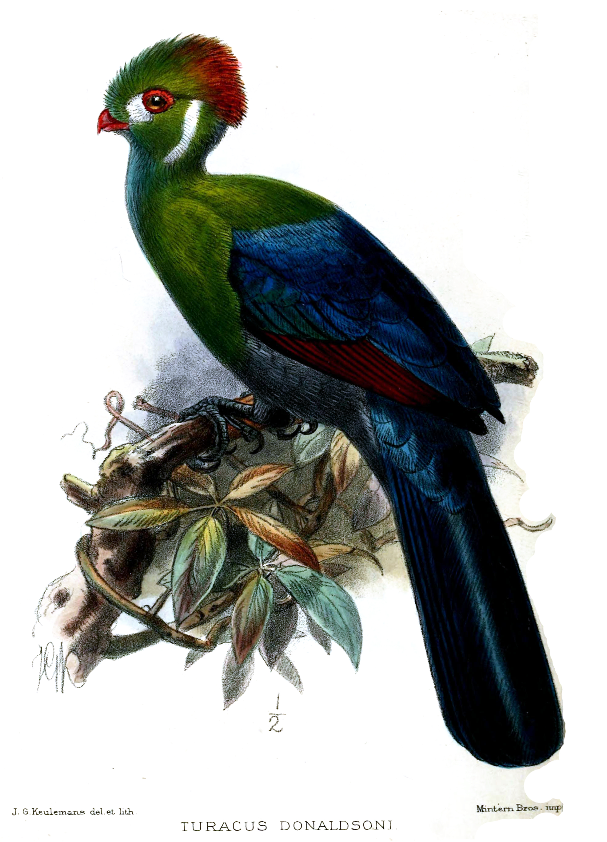 Turacus donaldsoni = Tauraco leucotis